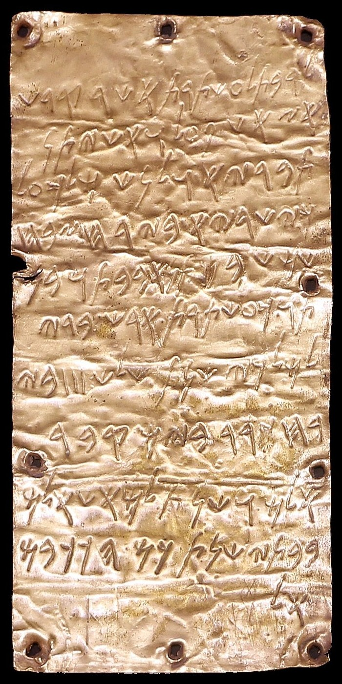 Villa Giulia (Rome)